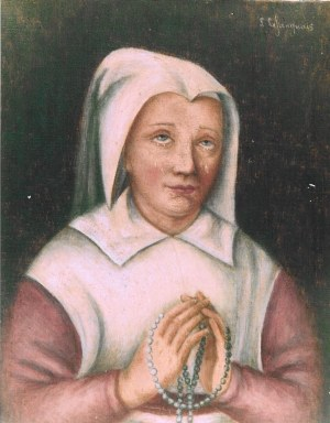 Portrait représentant sainte Marie de Vallées.